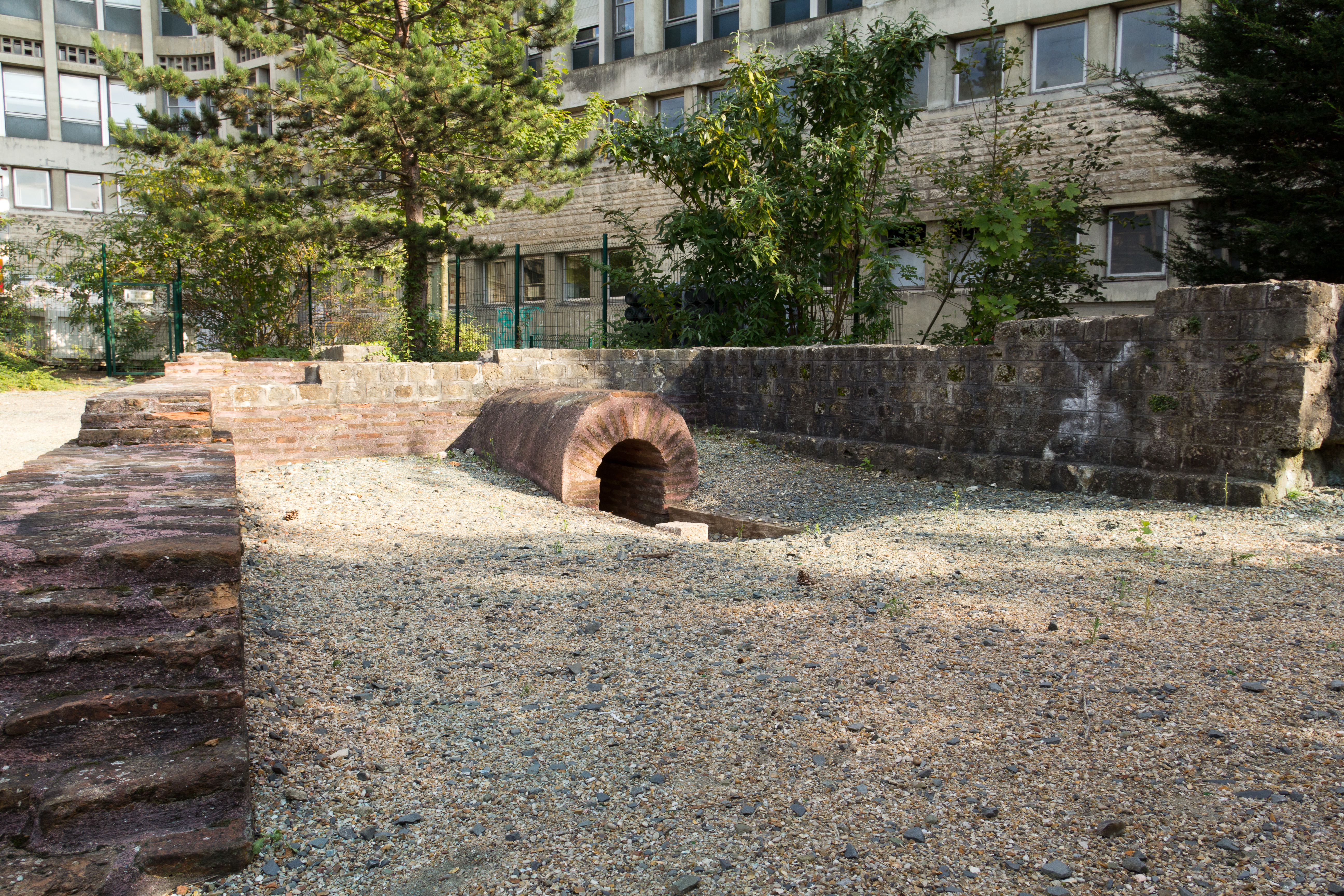 Vestiges d'une villa gallo-romaine à Lisieux. .